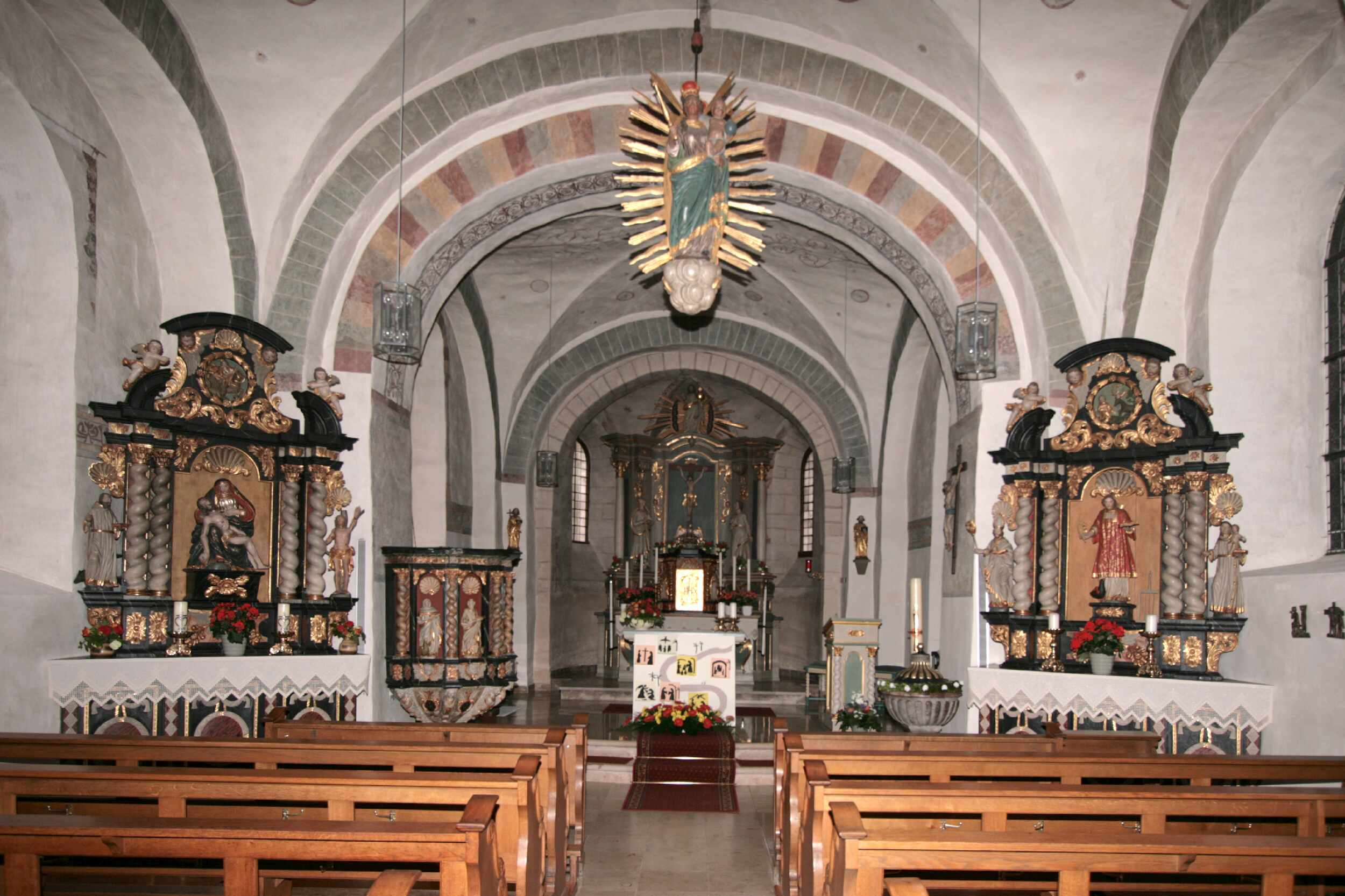 Kirche in Schmallenberg Lenne Innenansicht